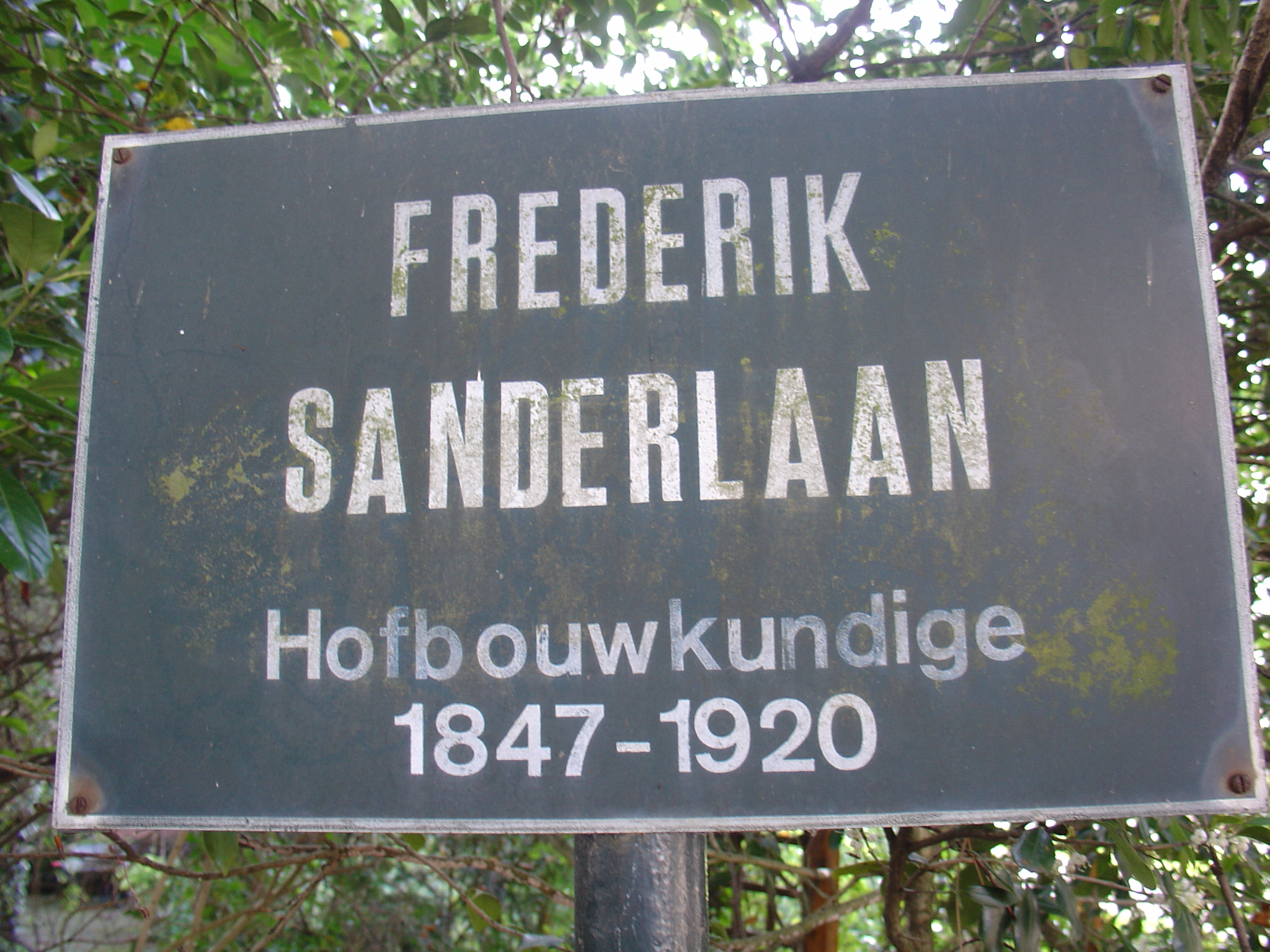 Straatnamenbord Frederik Sanderlaan